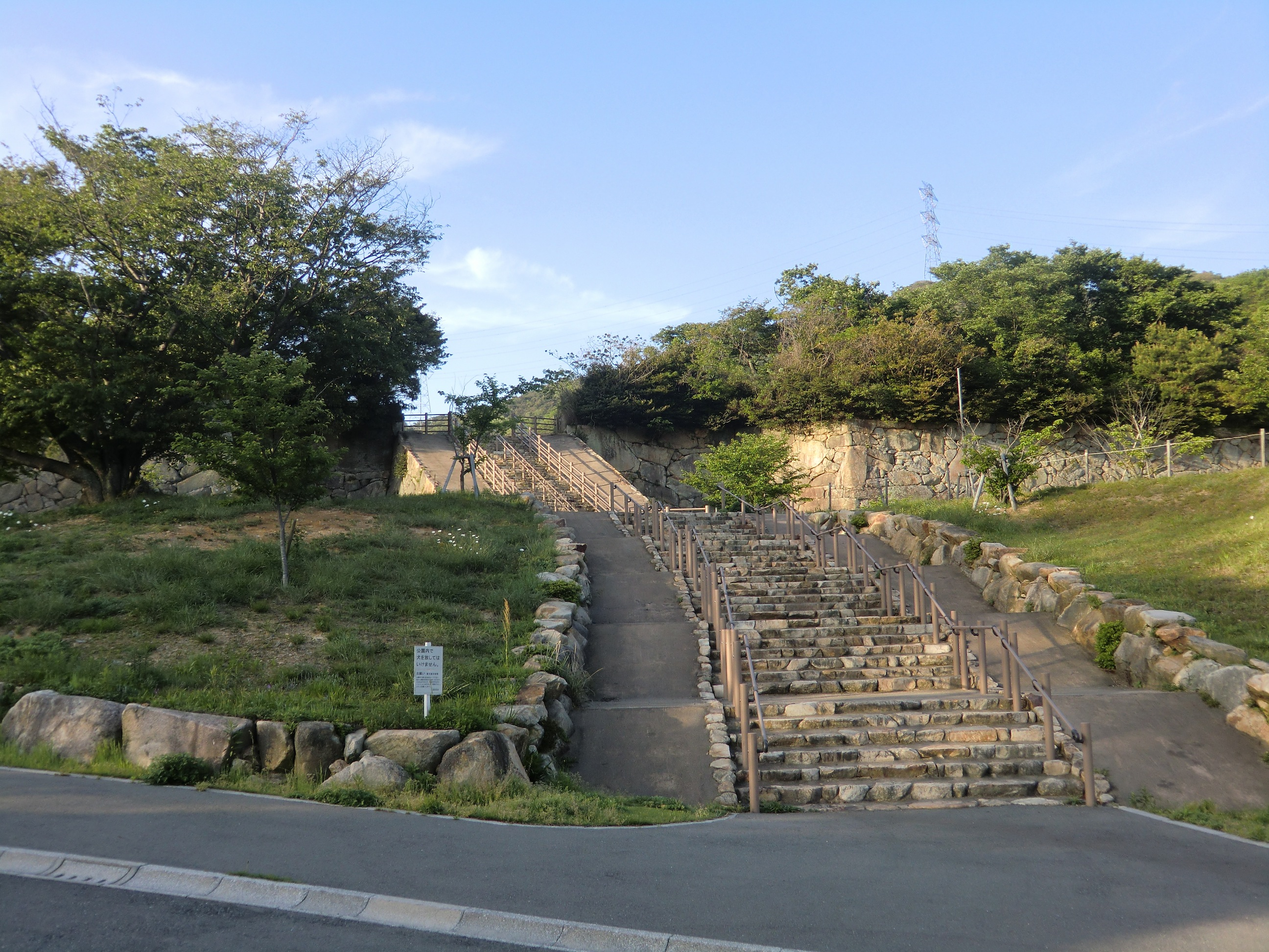 勝山地区公園の勝山御殿跡二の丸前（山口県下関市勝山）